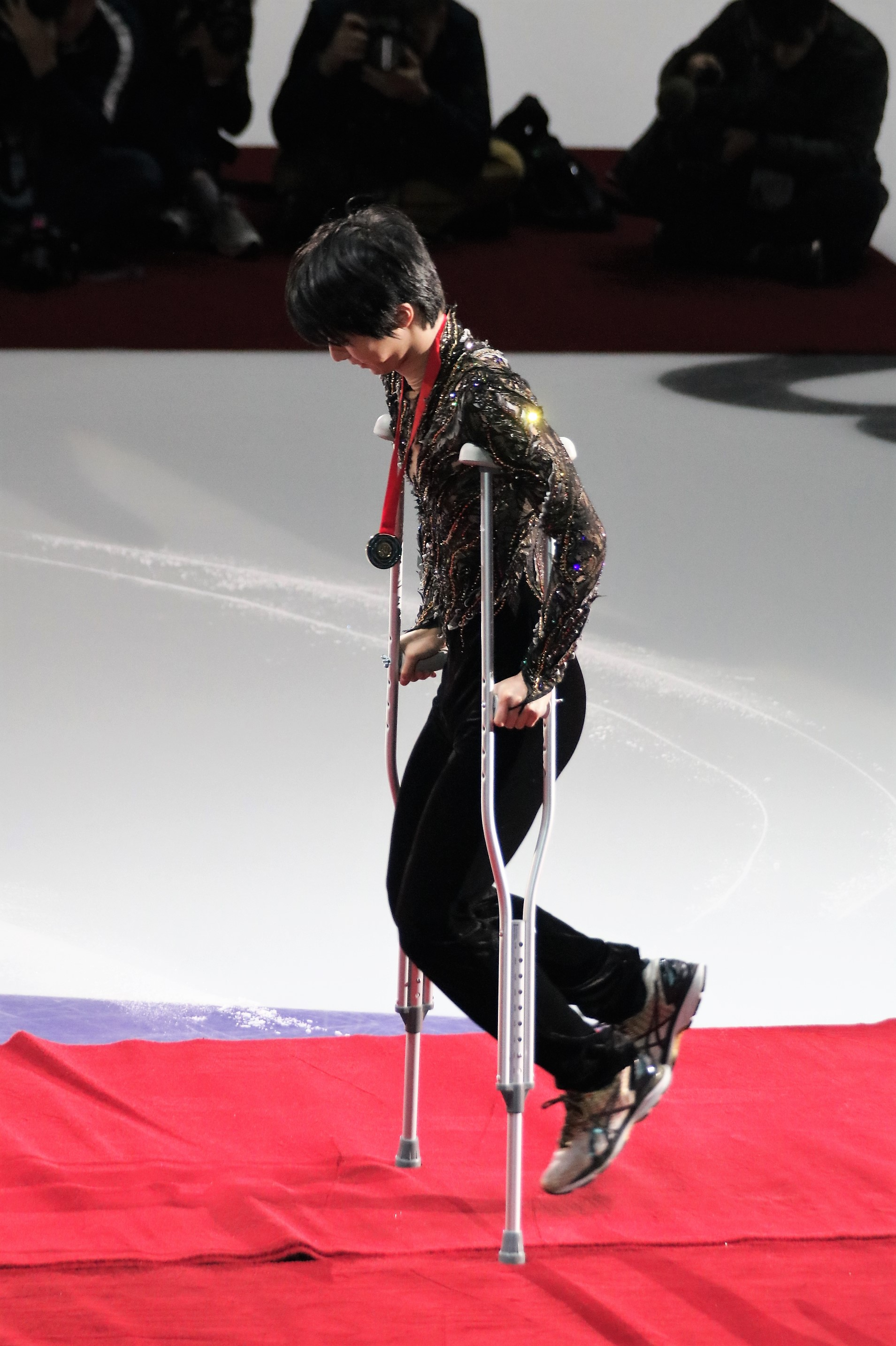 Юдзуру Ханю (Япония) на церемонии награждения Rostelecom Cup 2018